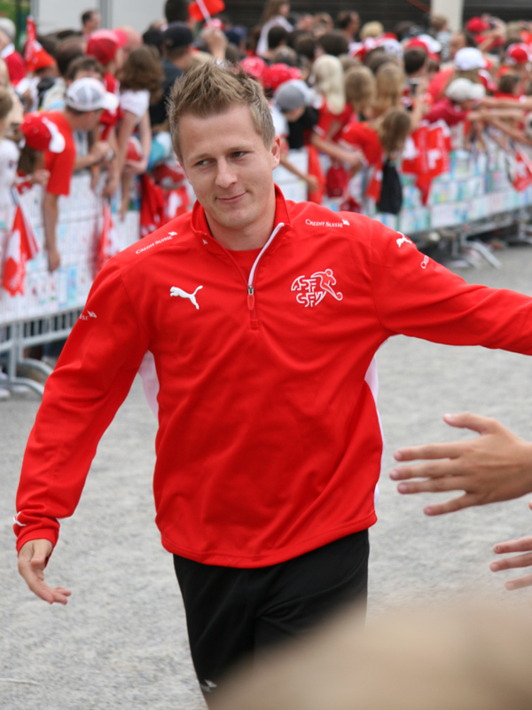 Christoph Spycher im Trainingslager der Schweizer Fussballnationalmannschaft vor der Euro 2008